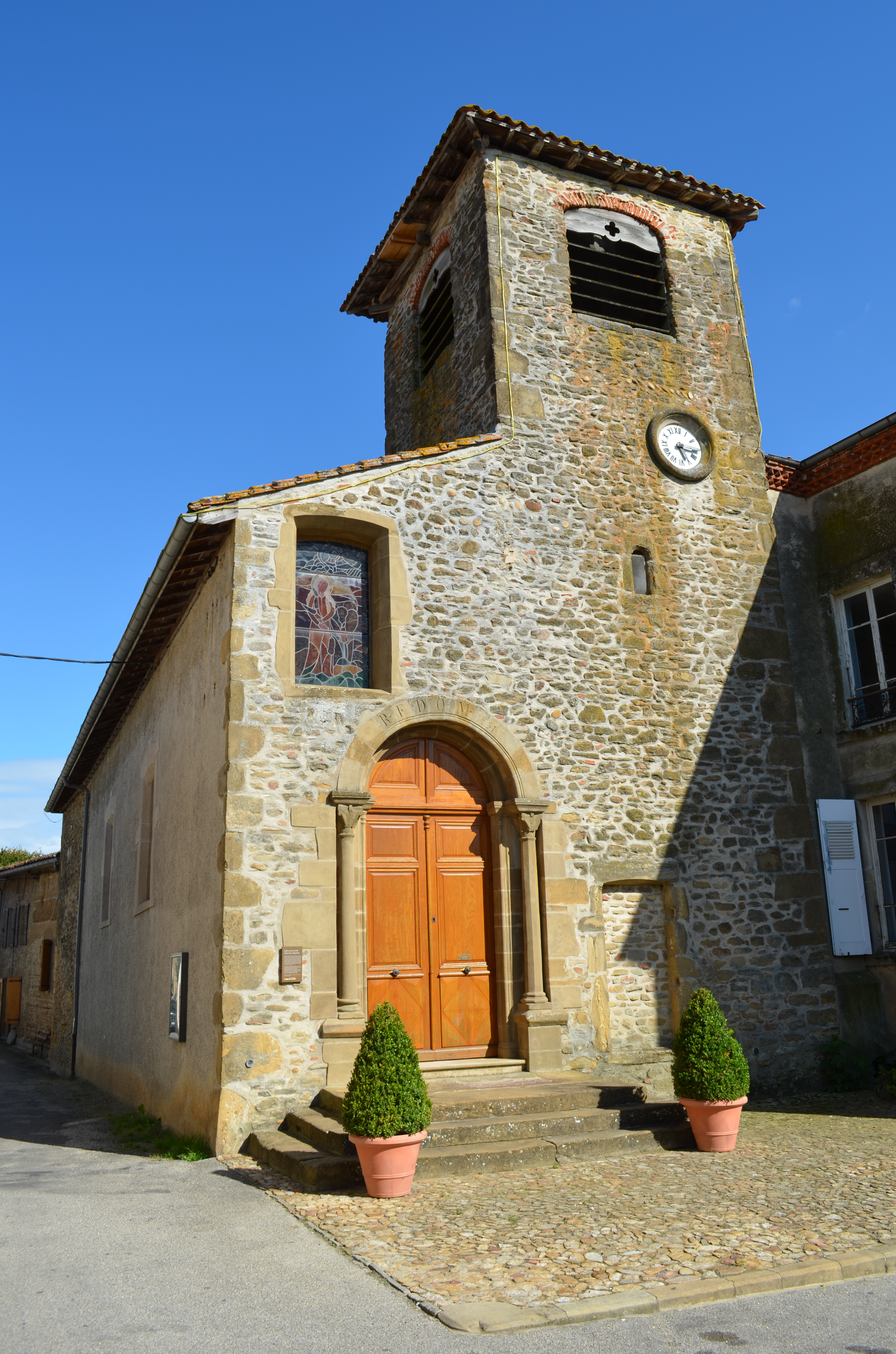 Façade de l'église de Revel à Revel-Tourdan, Isère (France).